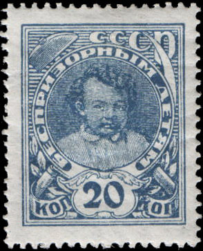 Почтовая марка СССР В помощь беспризорным детям.